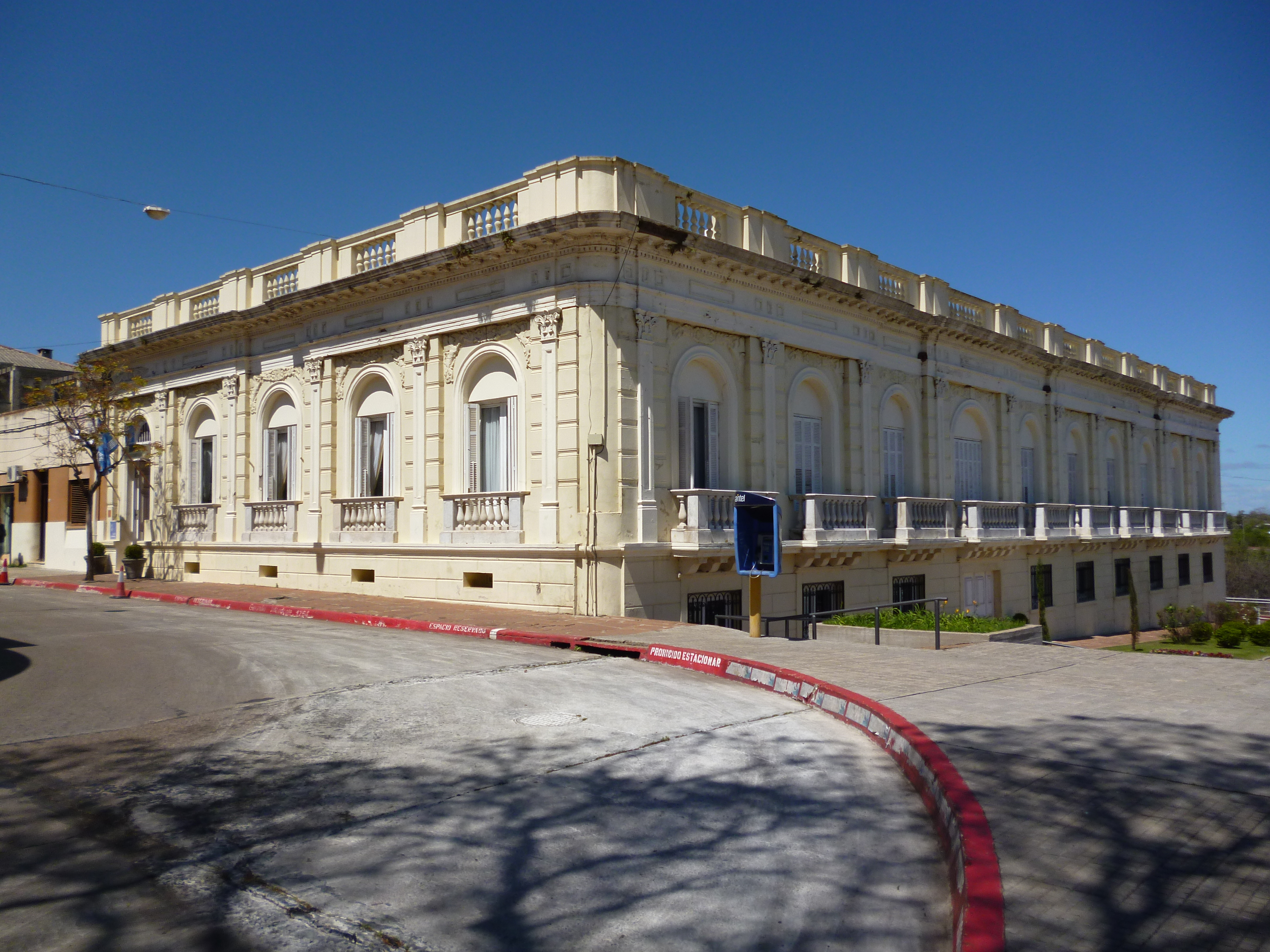 Actual Casa de Gobierno Departamental de Salto - Orig. Palacio Bica-Herrán conocido como Palacio Córdoba. Ubicada en el departamento de Salto